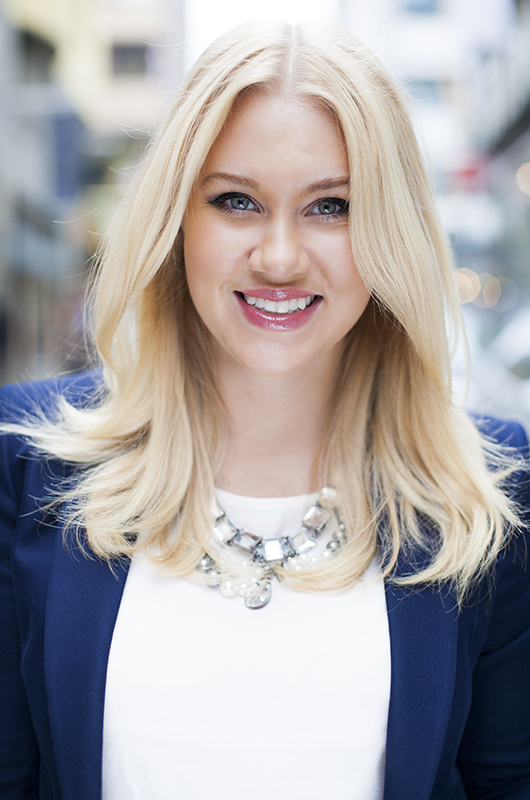 Bloggerskan Isabella Löwengrip alias "Blondinbella".